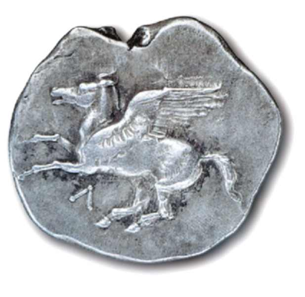 Το έμβλημα του Δήμου Λευκάδας